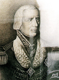 Generale Giuseppe Parisi